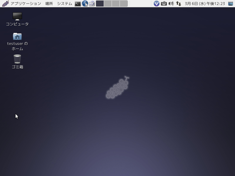 Vine Linux 6.1 のデスクトップ画面